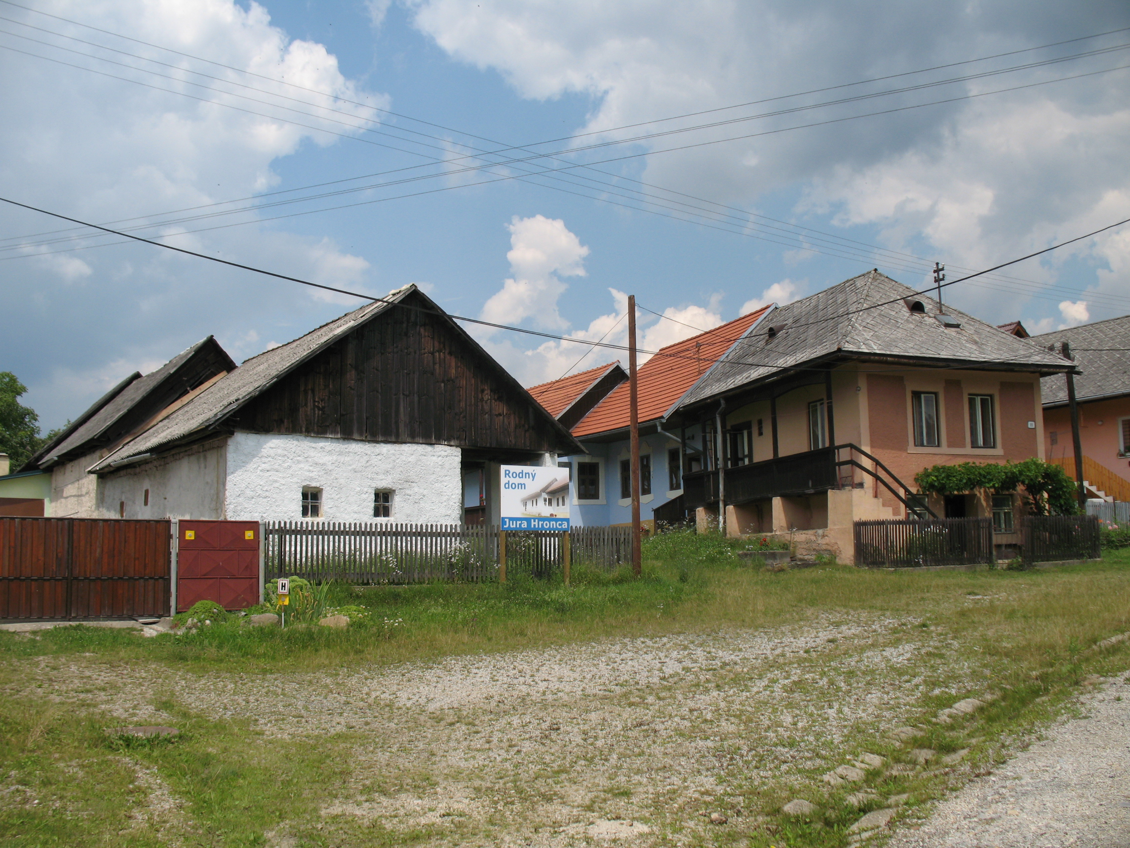 Gócs falu